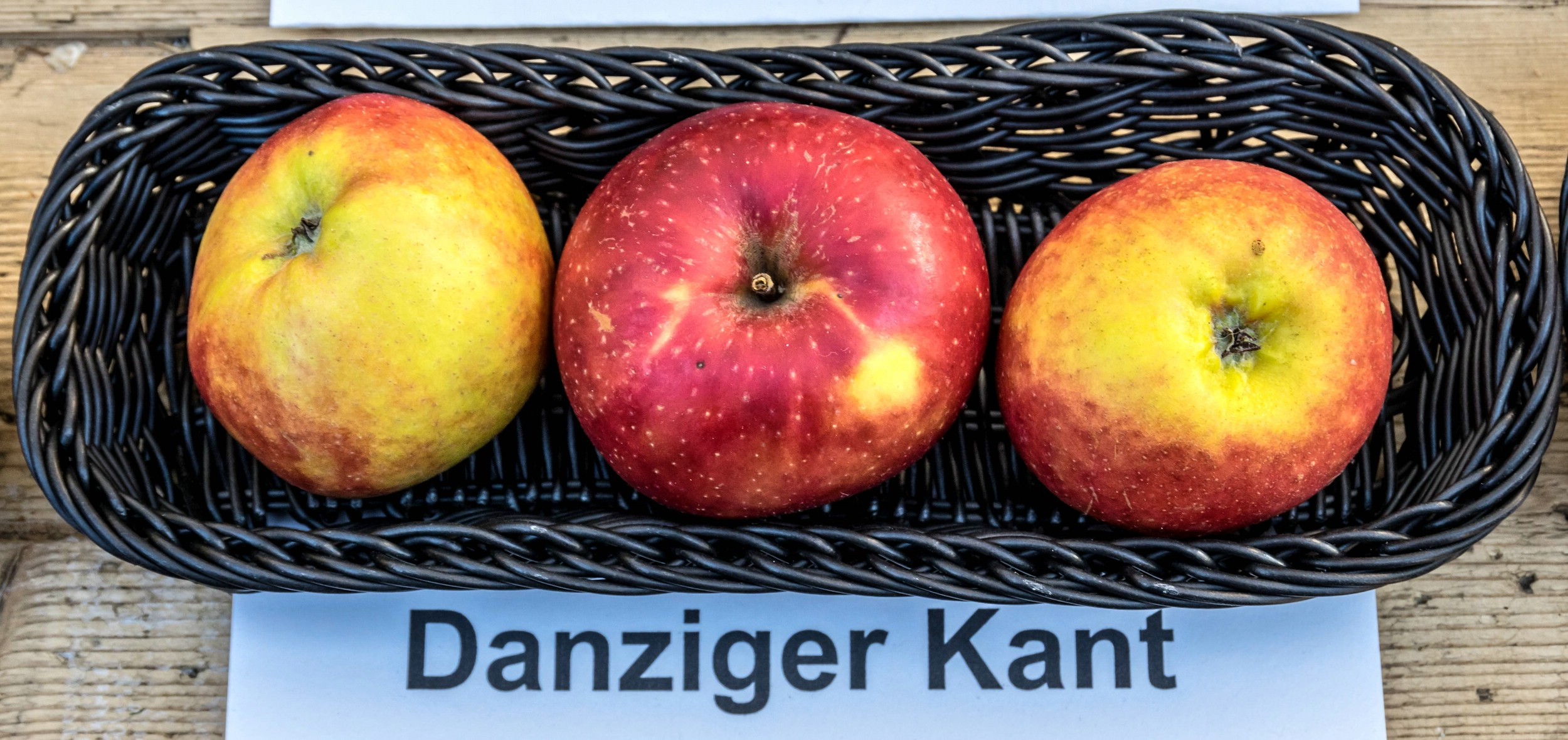 Alte Apfelsorten, von denen es im Badischen noch tragende Bäume gibt. Alle Aufnahmen au dem Oktober 2015